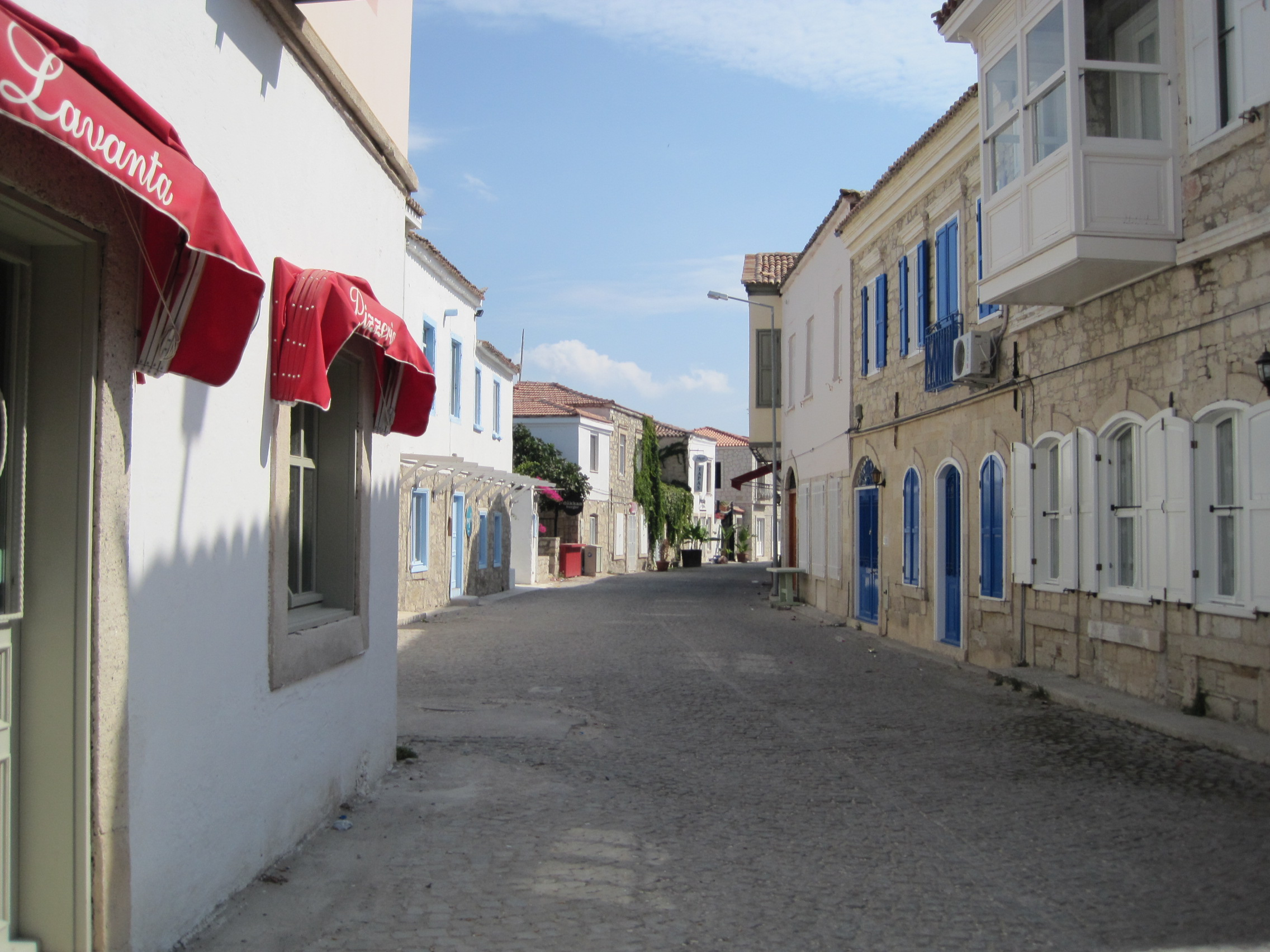 Yeni Mecidiye, 35930 Alaçatı/Çeşme/İzmir, Turkey